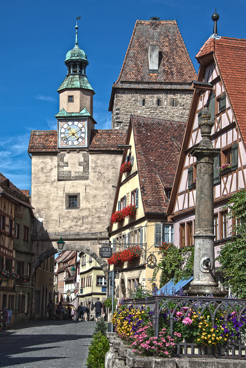 Röderbogen